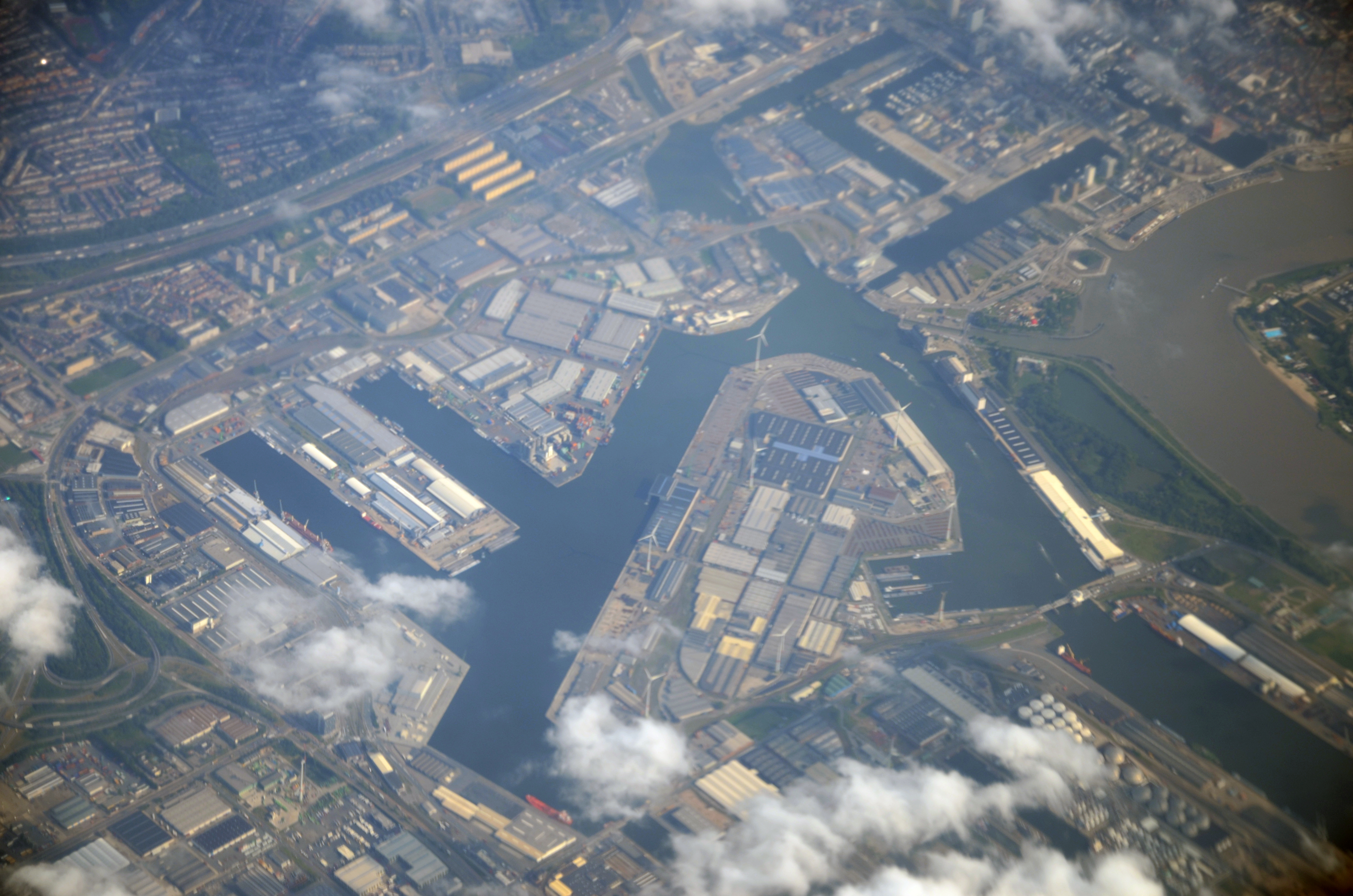 Het Albert Dok in Antwerpen, gefotografeerd vanuit een lijnvlucht op 22 augustus 2018.